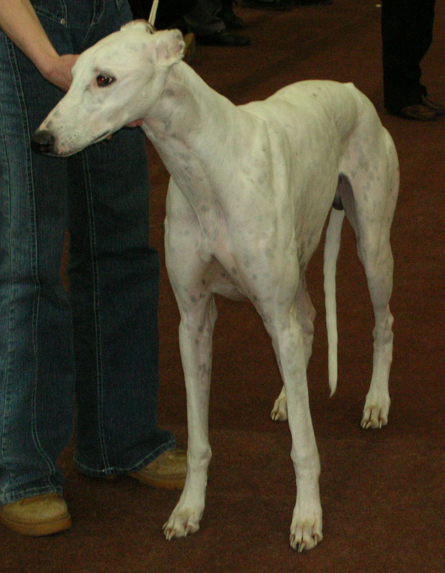 Autor:Małgorzata Miłaszewska (Wikipedysta:Lilly M)- za zgodą Miejsce: Wystawa psów rasowych, Katowice - Spodek czas: marzec 2005